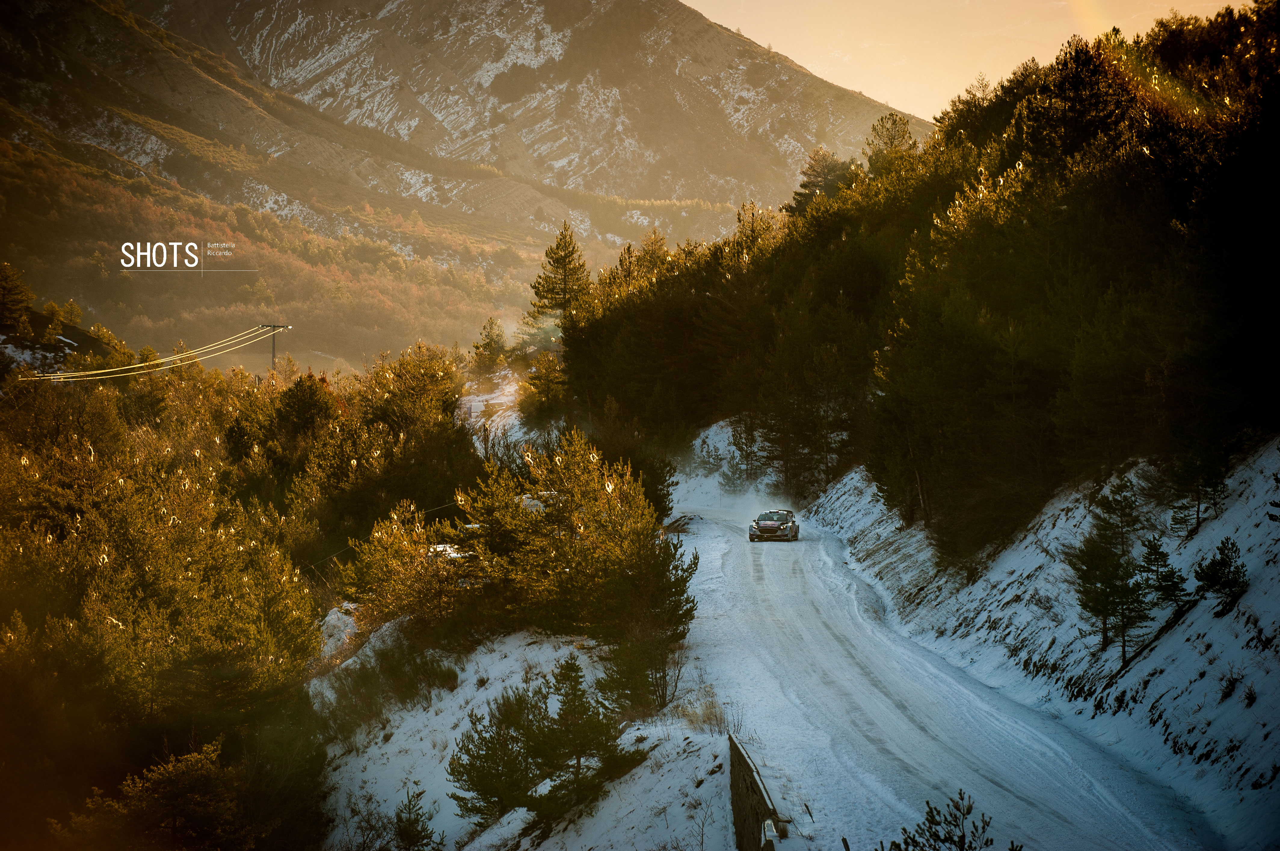 Sebastien Ogier lors du Rallye Monte Carlo 2017.